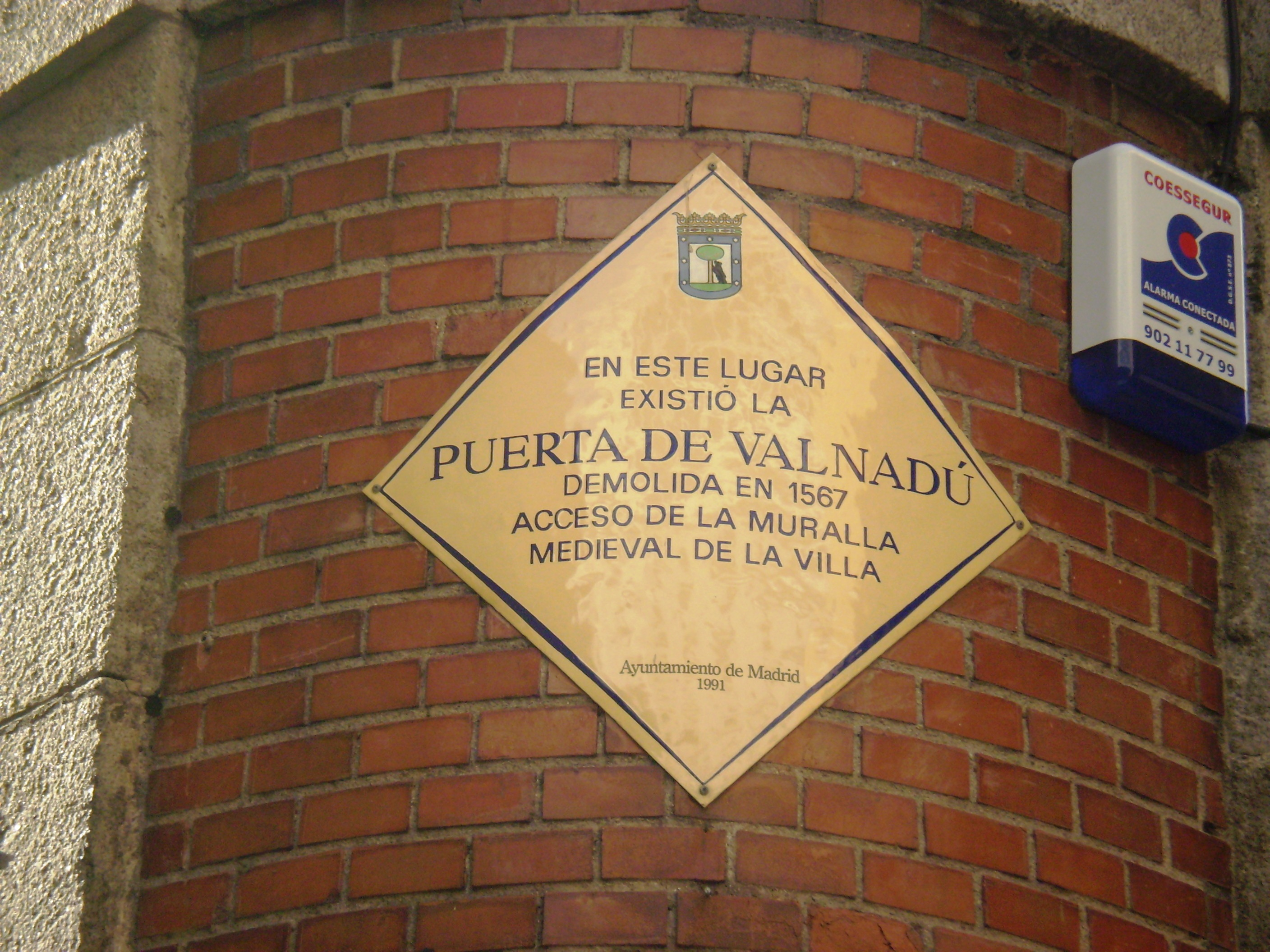 Muralla cristiana de Madrid. Localización de la desaparecida Puerta de Valnadú